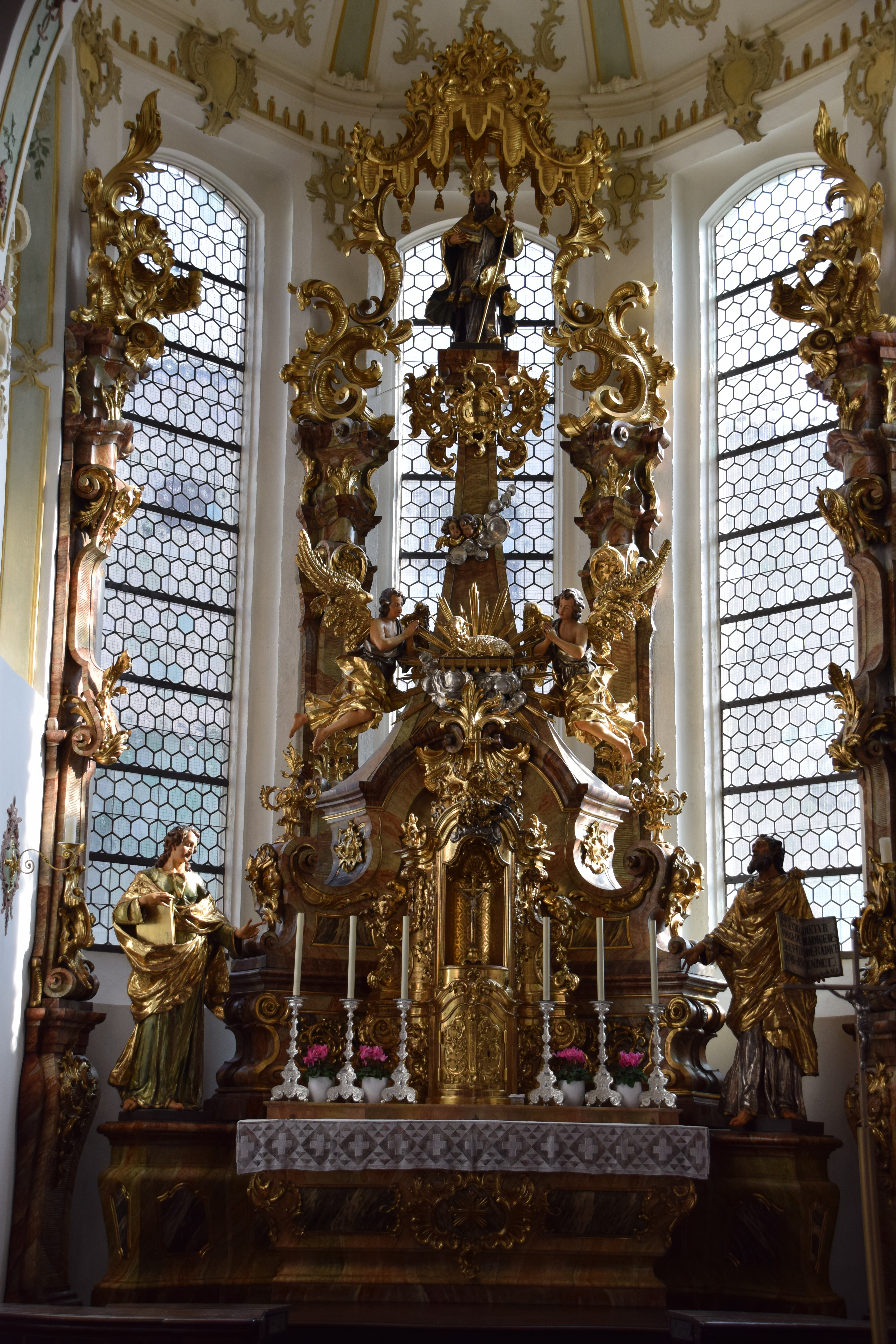 Hochaltar der Stiftspfarrkirche St. Kassian in Regensburg